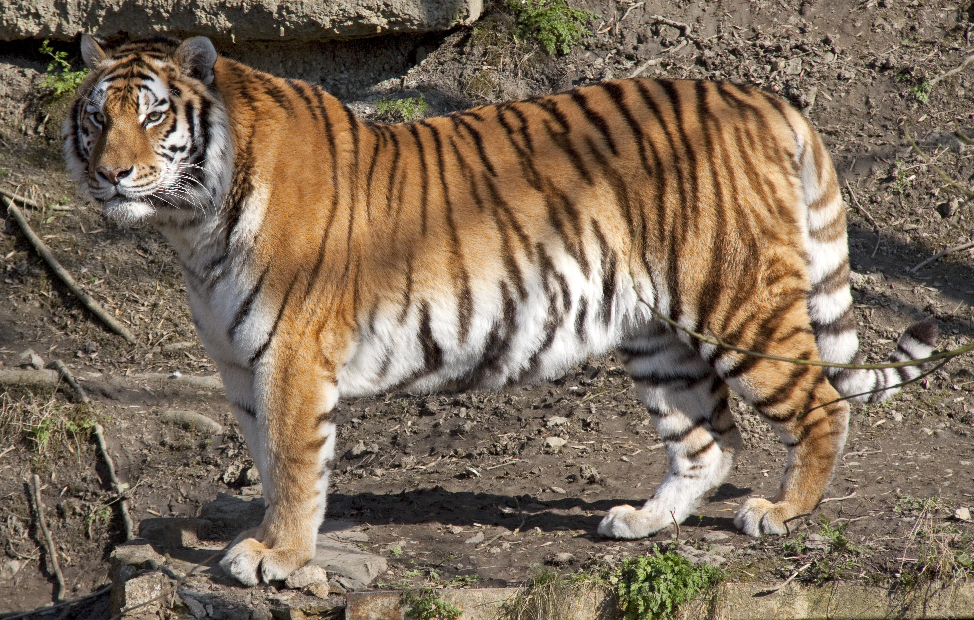 Amur Tiger 1d